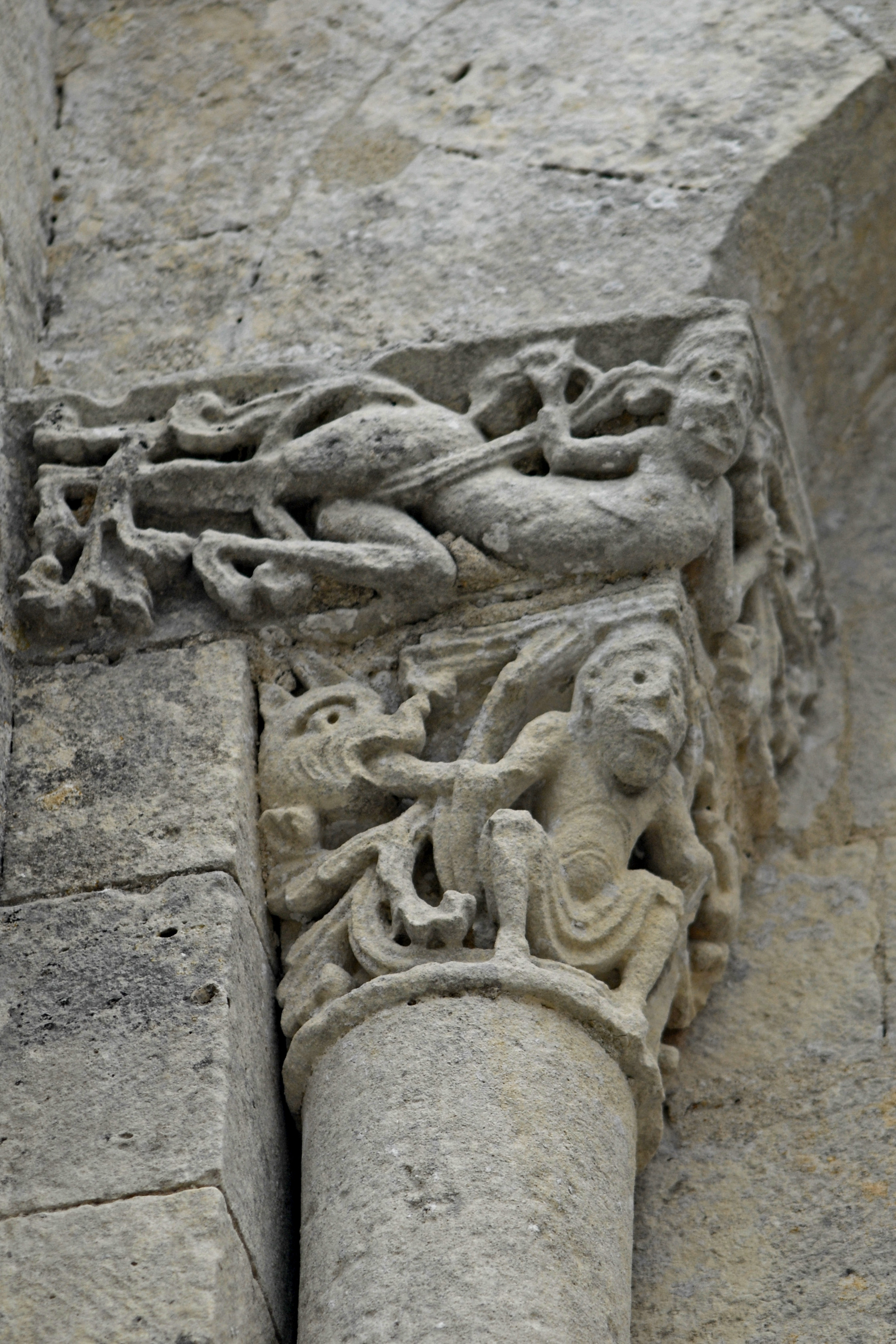 Notre-Dame Corme-Écluse,Kapitell OG Nr. 11